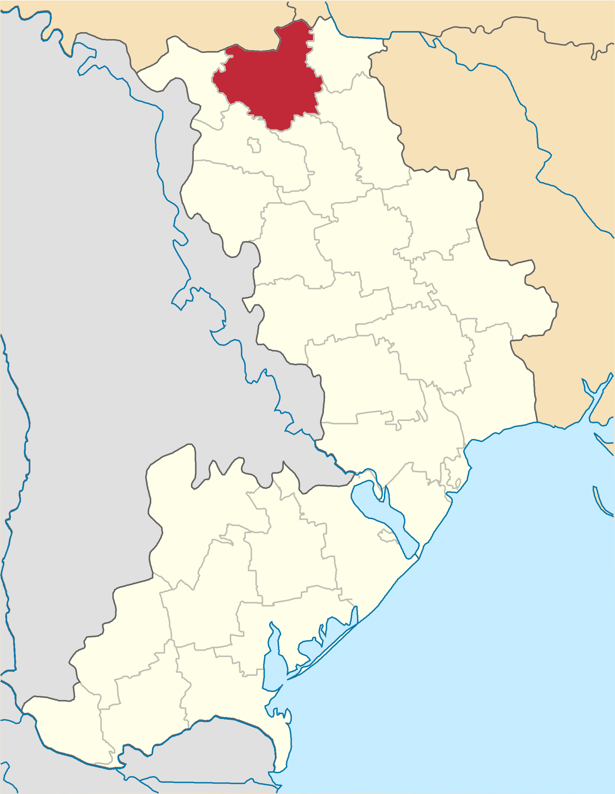 Baltenskyi-Raion map